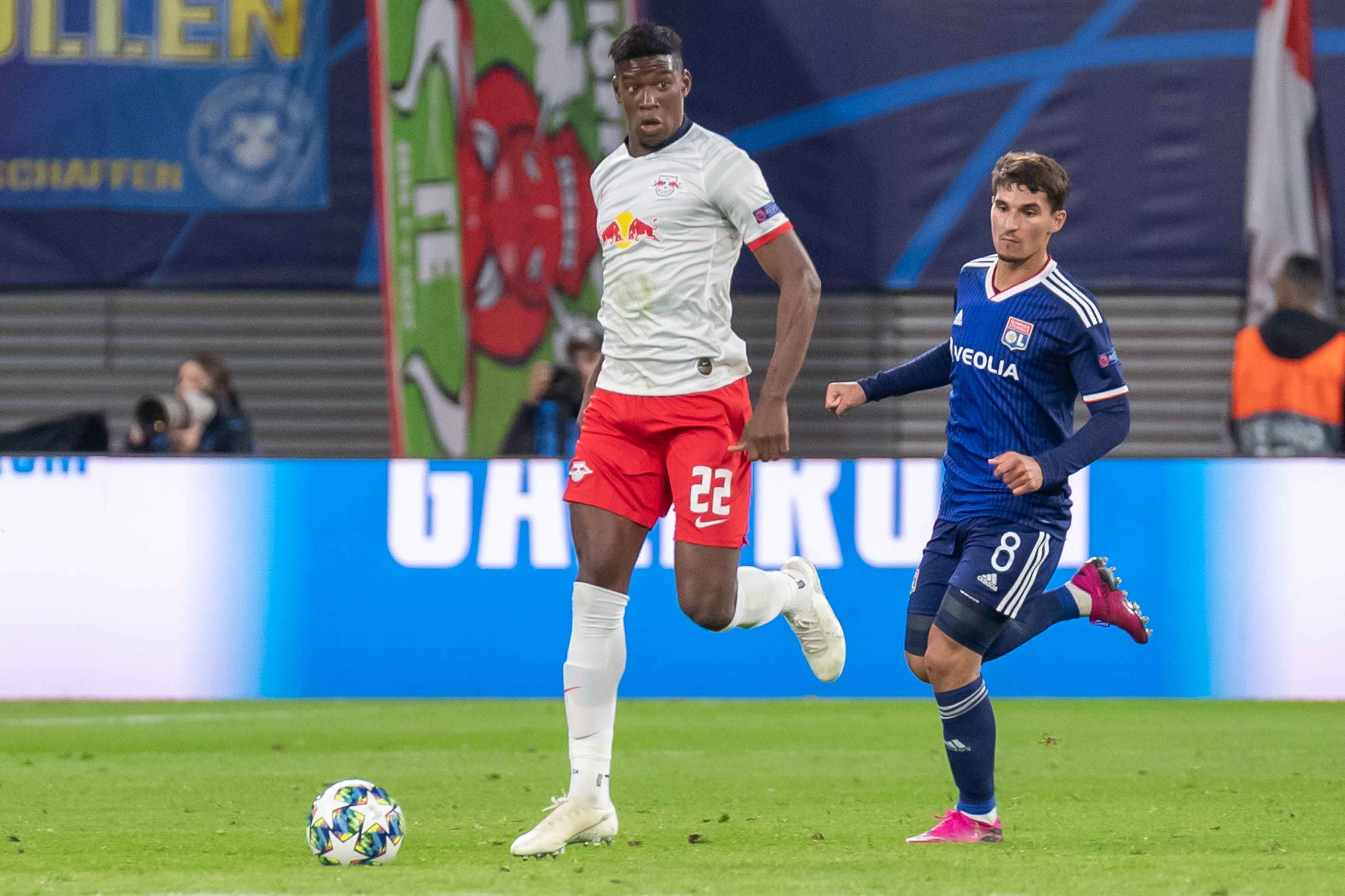 Fußball, Männer, UEFA Champions League, RB Leipzig - Olympique Lyonnais; v.li.: Nordi Mukiele (RB Leipzig, 22), Houssem Aouar (Olympique Lyonnais, 8); Laufduell